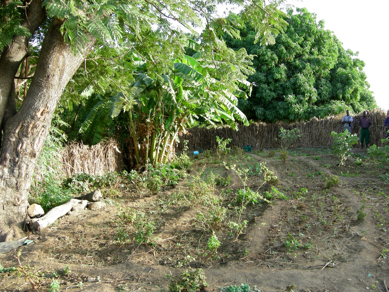 Burkina faso: Kleingärten in Dourtenga